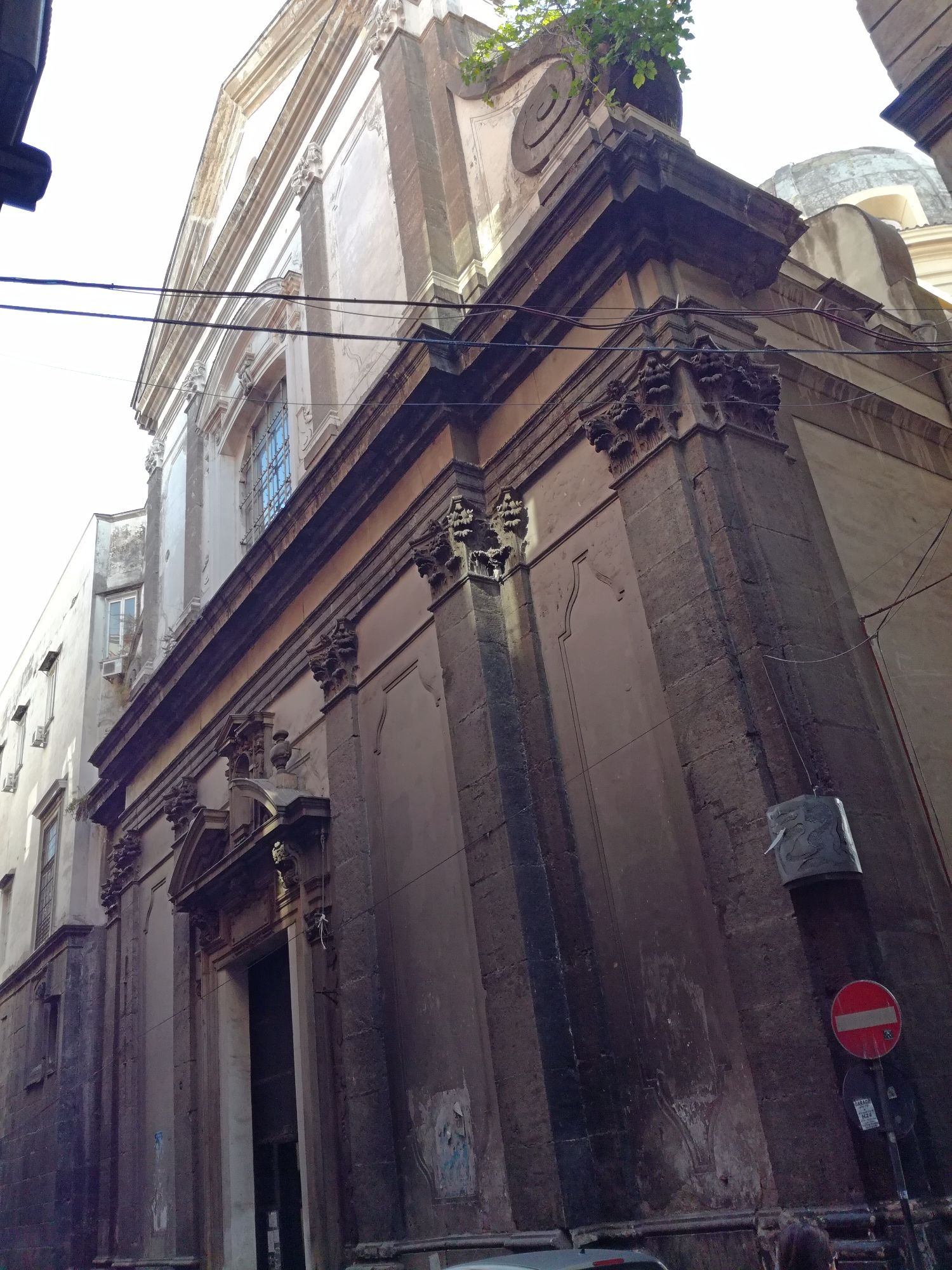 Facciata di Santa Maria della Pace (Napoli)